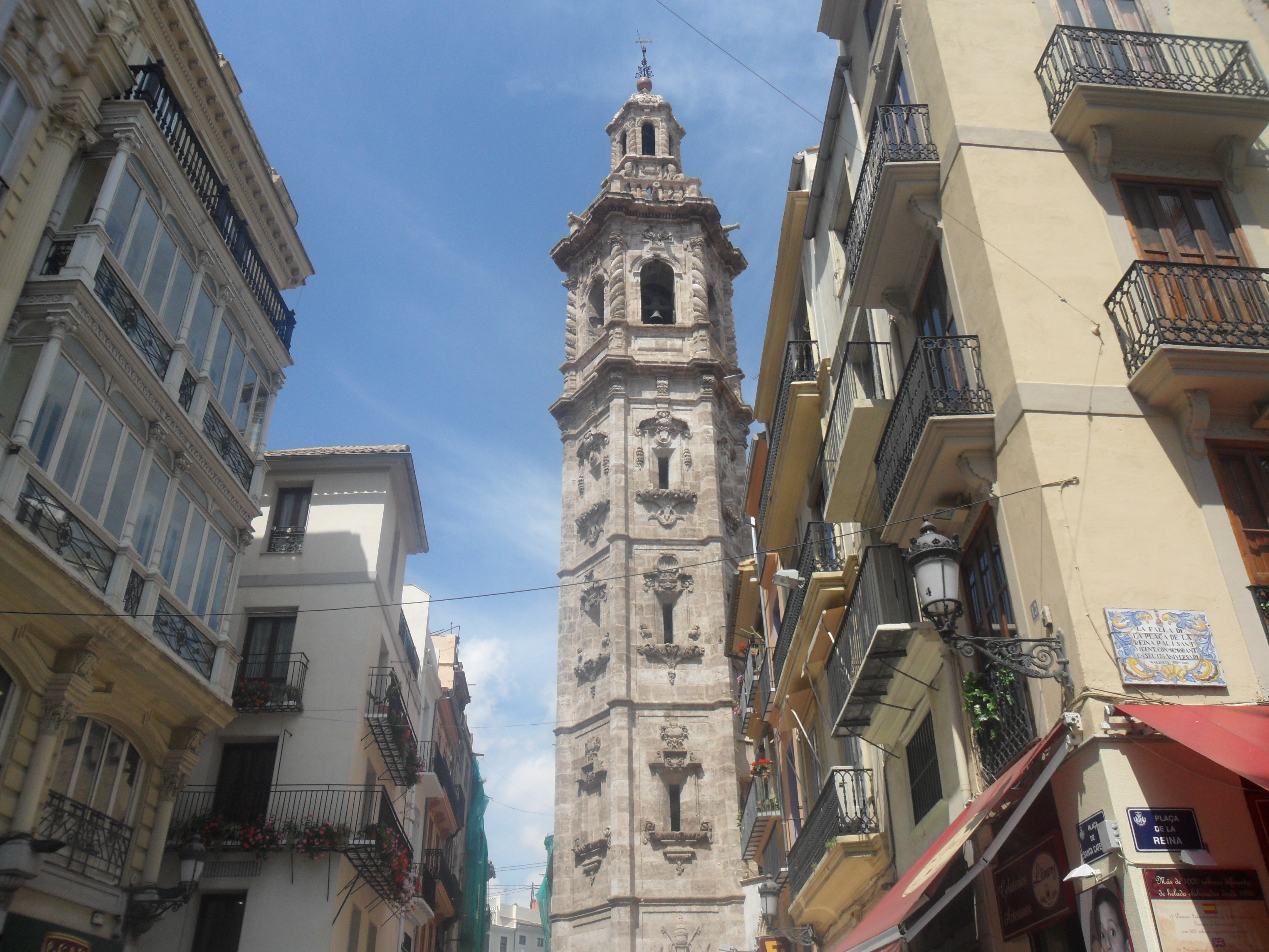 Esglesia de santa Catalina